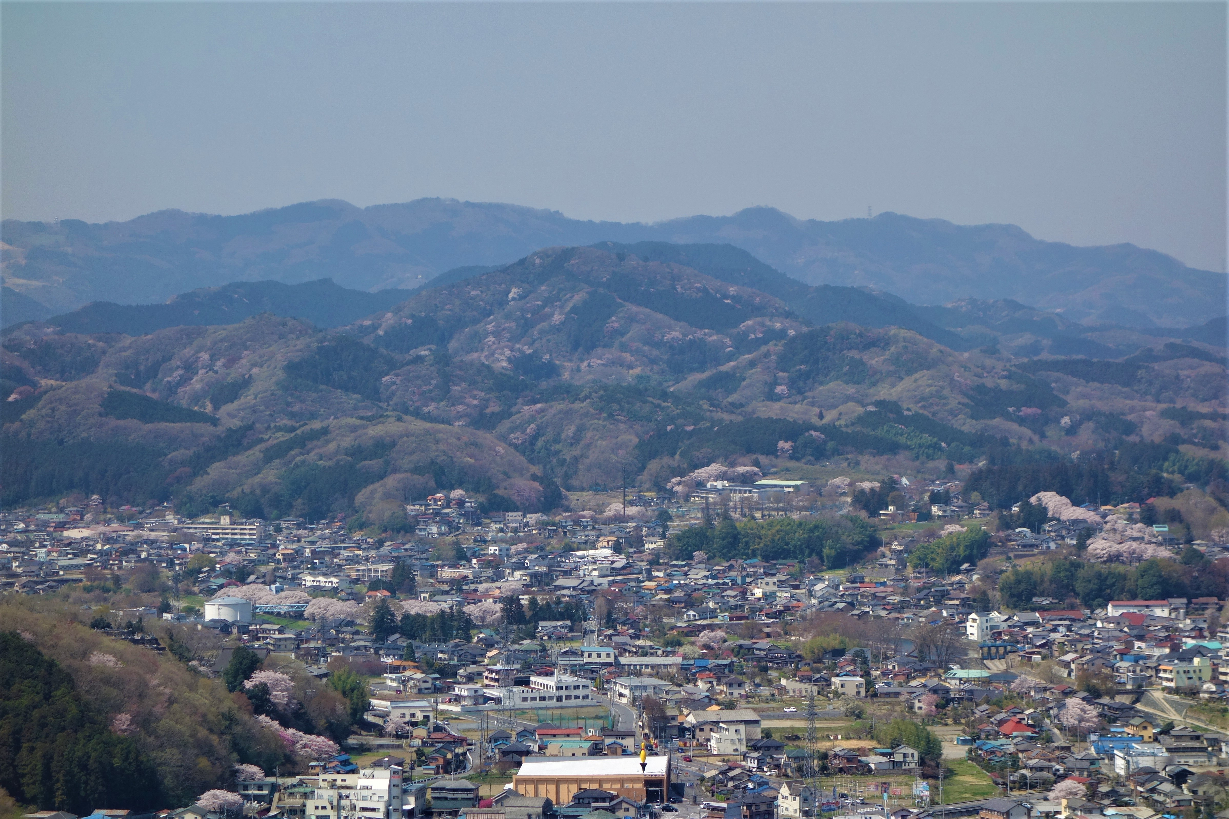 仙元山見晴らしの丘公園展望台からの官ノ倉山